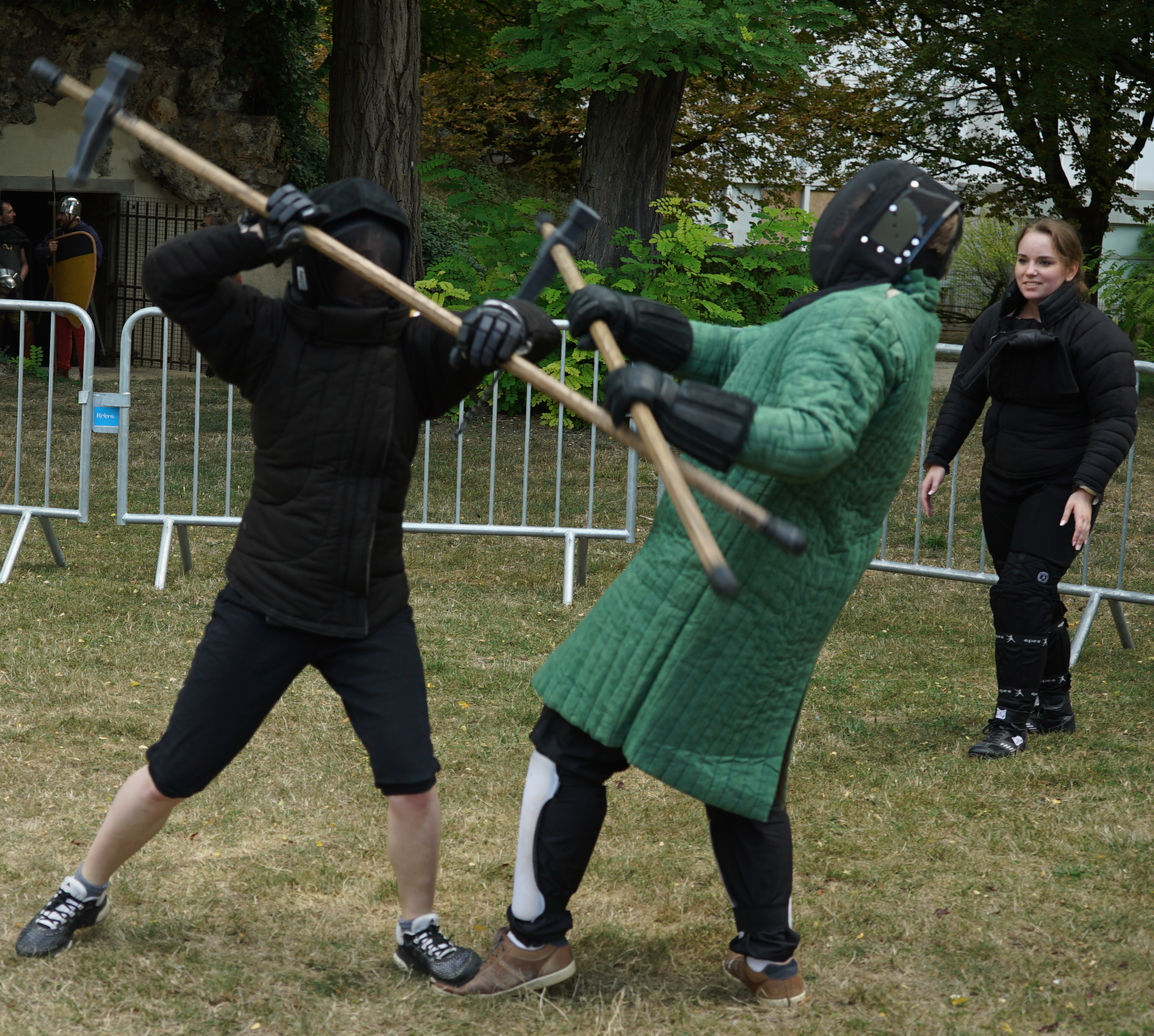 visite commentée et animées du jardin à l'occasion des journées du patrimoine. .